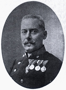 Alois Koch (1864-1917), österreichischer Architekt